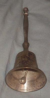 Cloche à main - origine wiki en: photo prise par user:Montrealais - Image:Bell.jpg